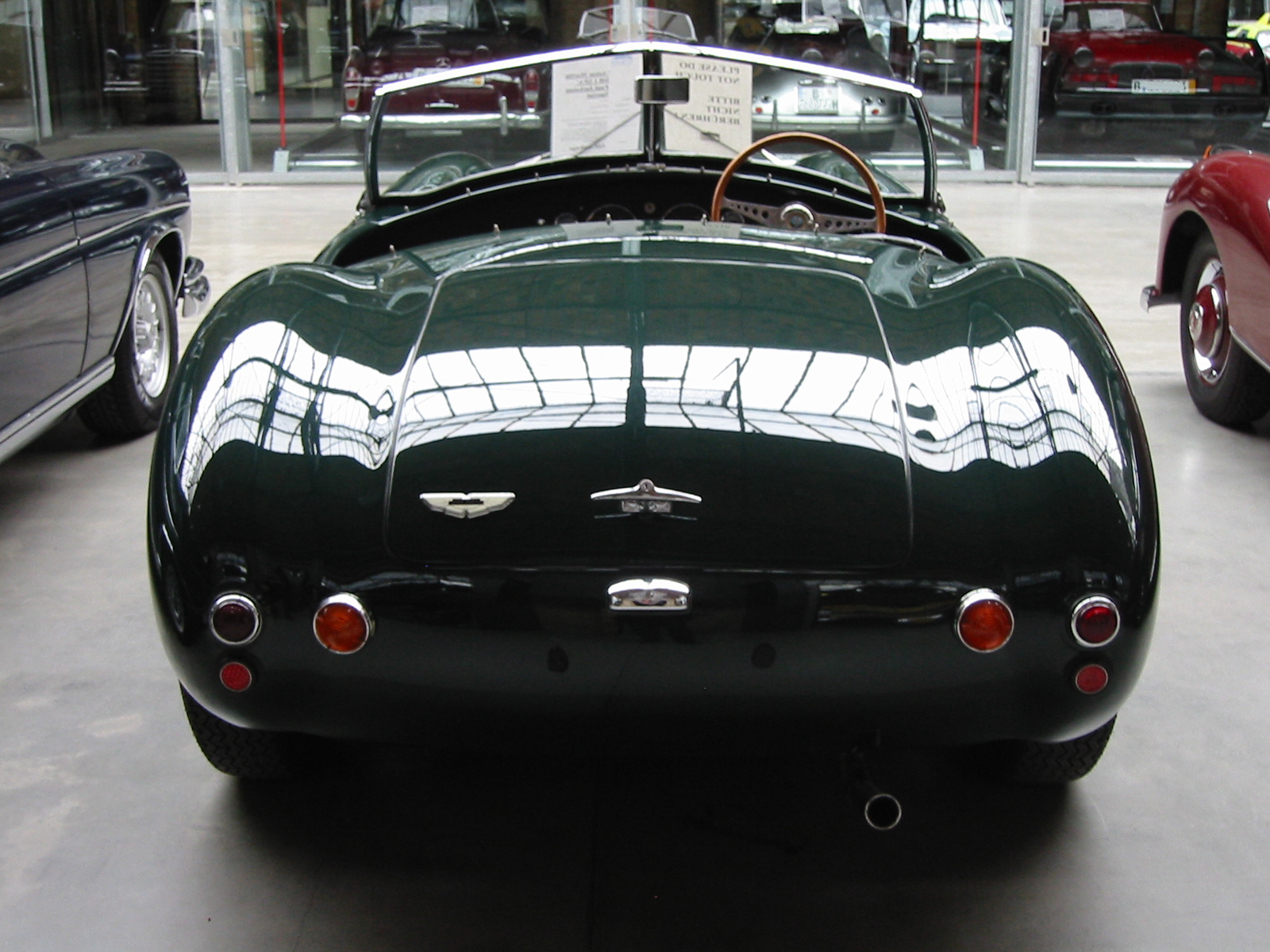 'Aston Martin DB1 SPA' Paul Jackman Special 1953/48, Frühjahr 2010 im Meilenwerk Berlin.